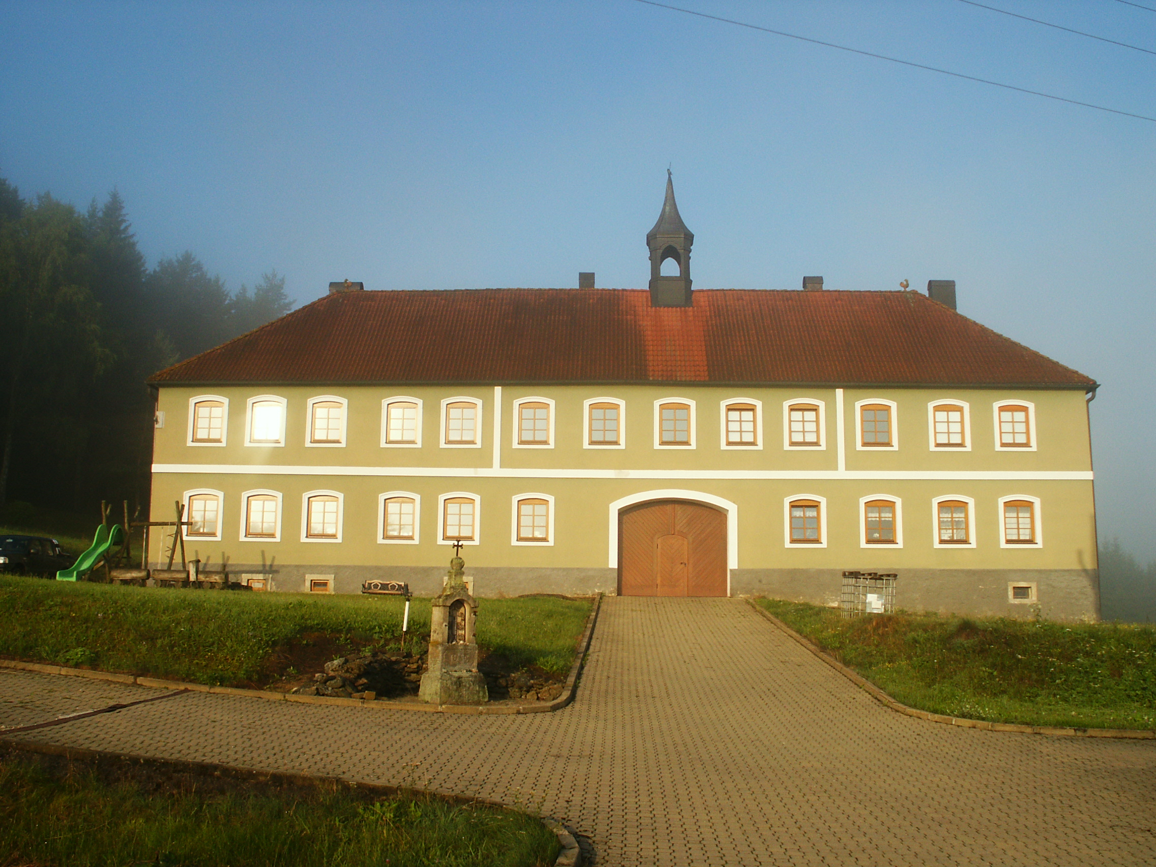 Těchoraz - č.p. 2